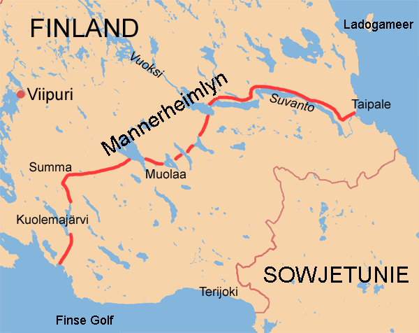 Kaart van die Mannerheimlyn